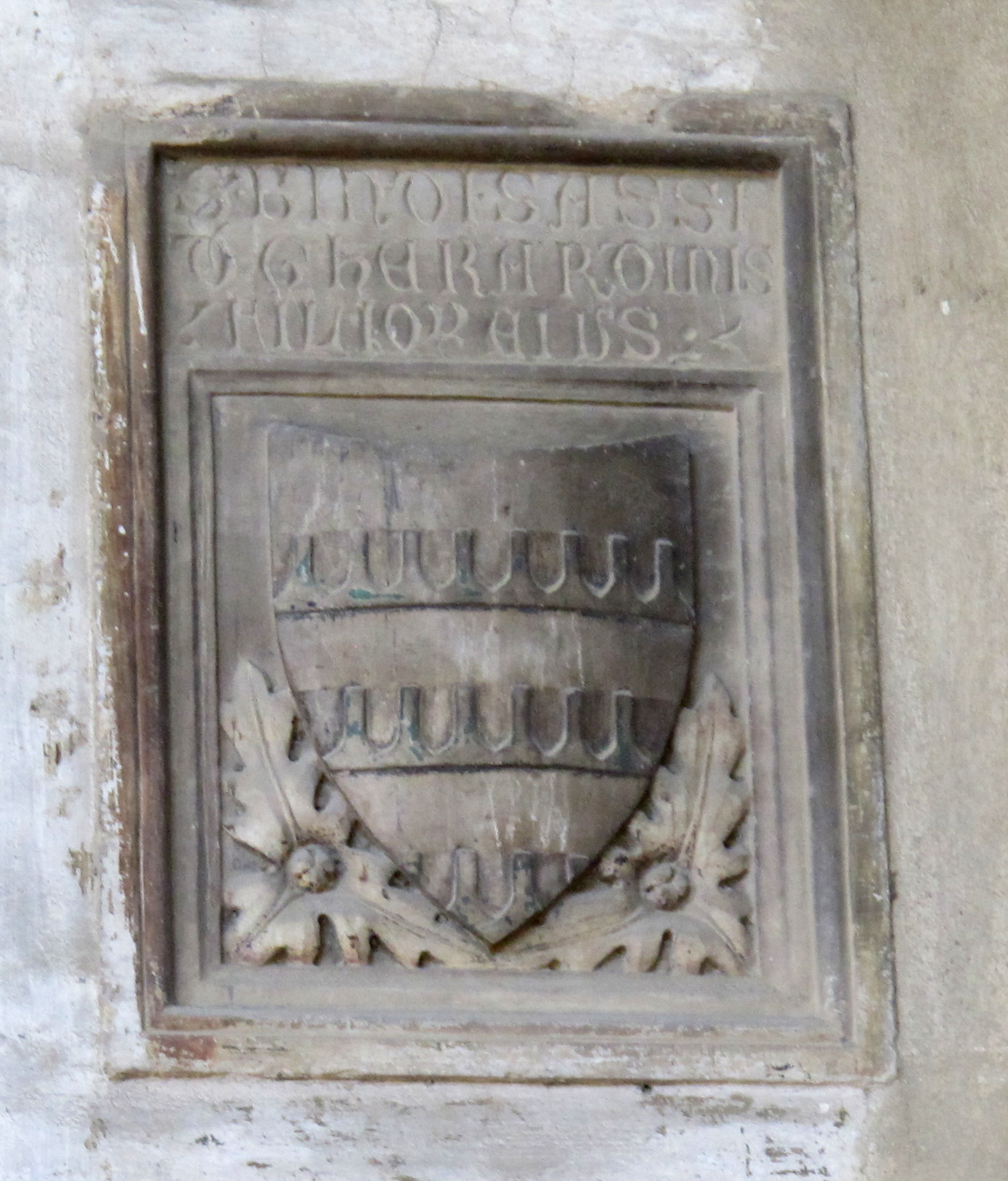 Santa croce, loggiato sud, stemma gherardini